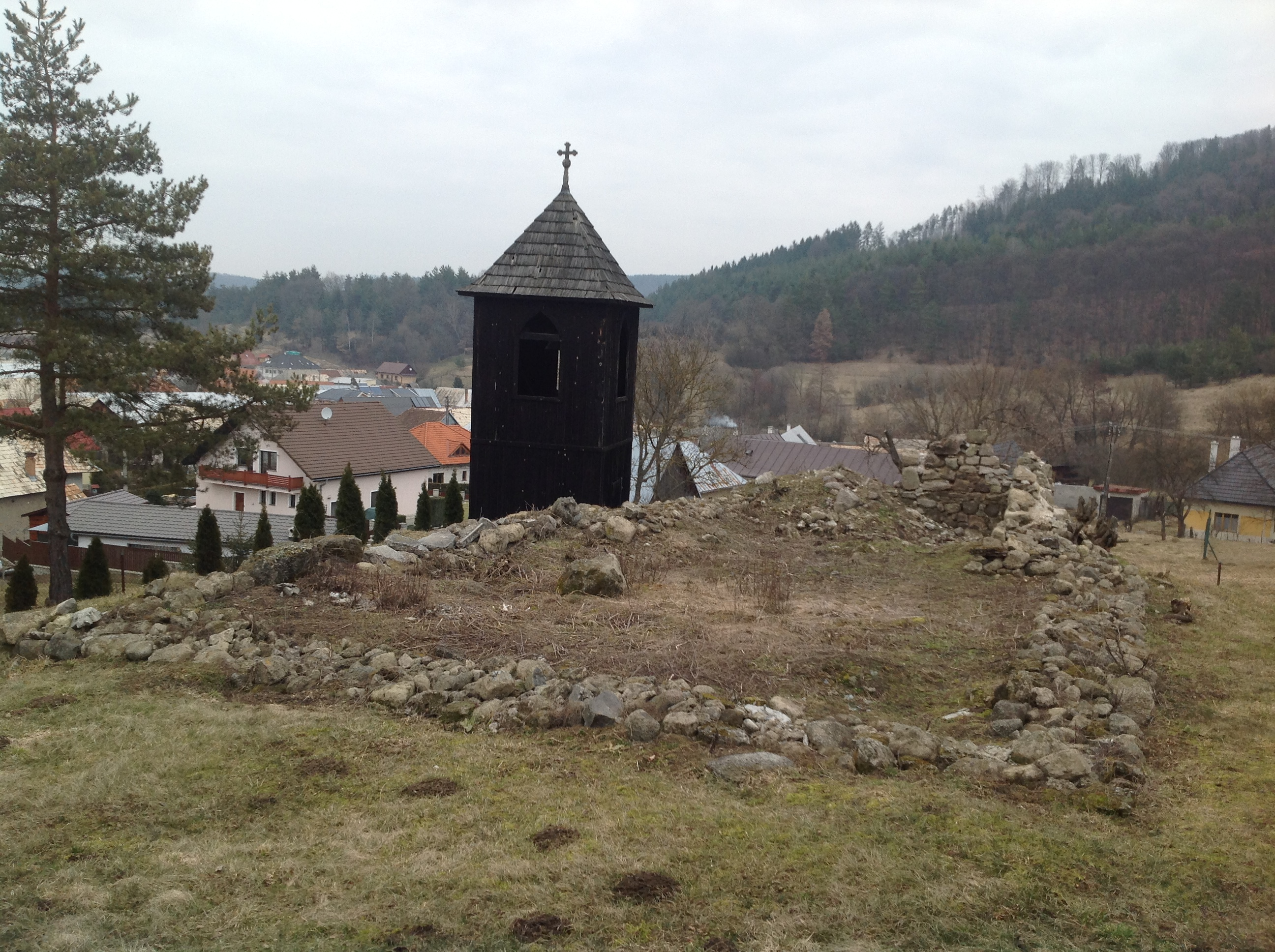 Ruiny kostolíka sv. Michala Archanjela s drevenou vežou z roku 1885. Vo je funkčný zvon z roku 1686.